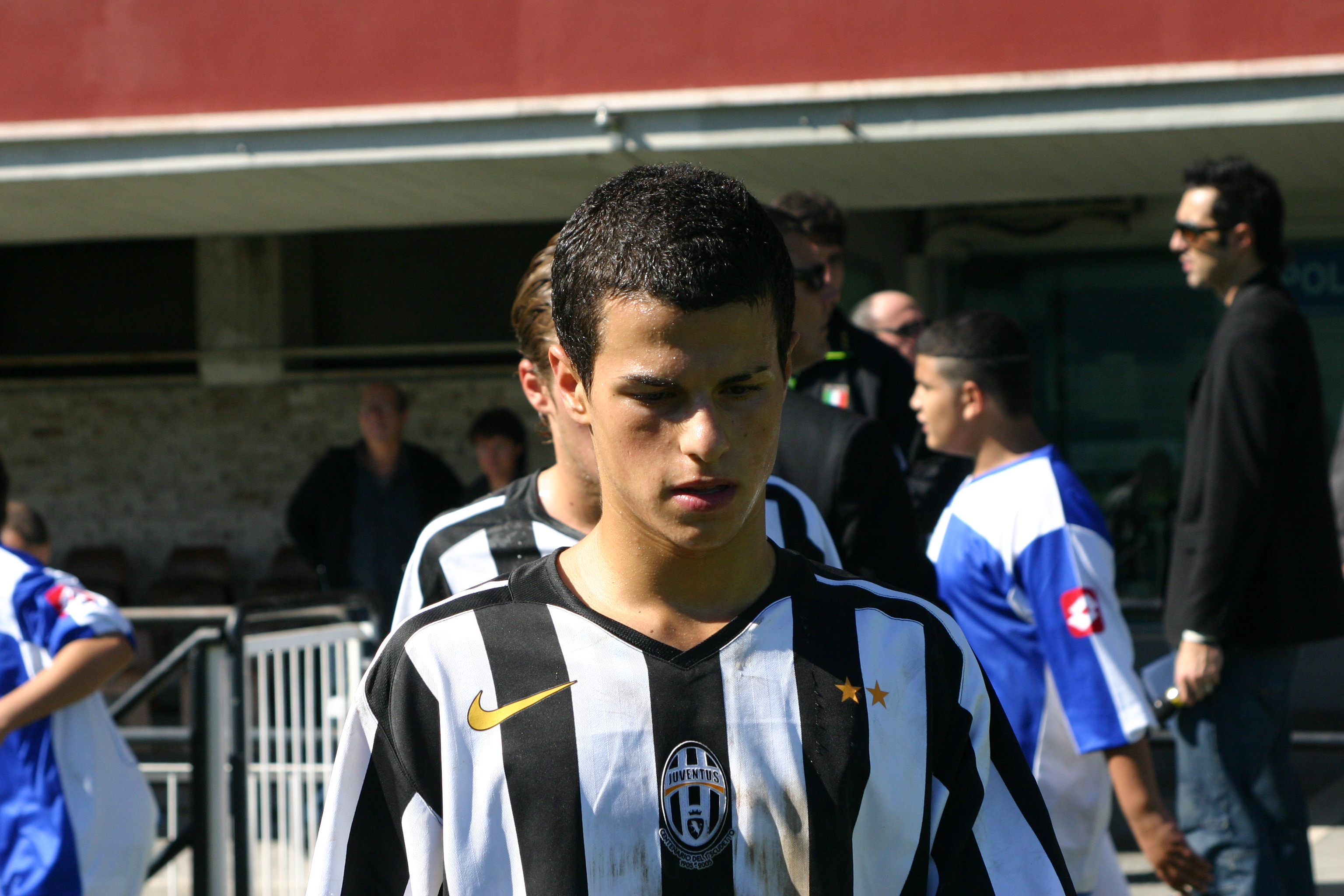 Giovinco prima della finale della prima edizione del Trofeo Karol Wojtyla